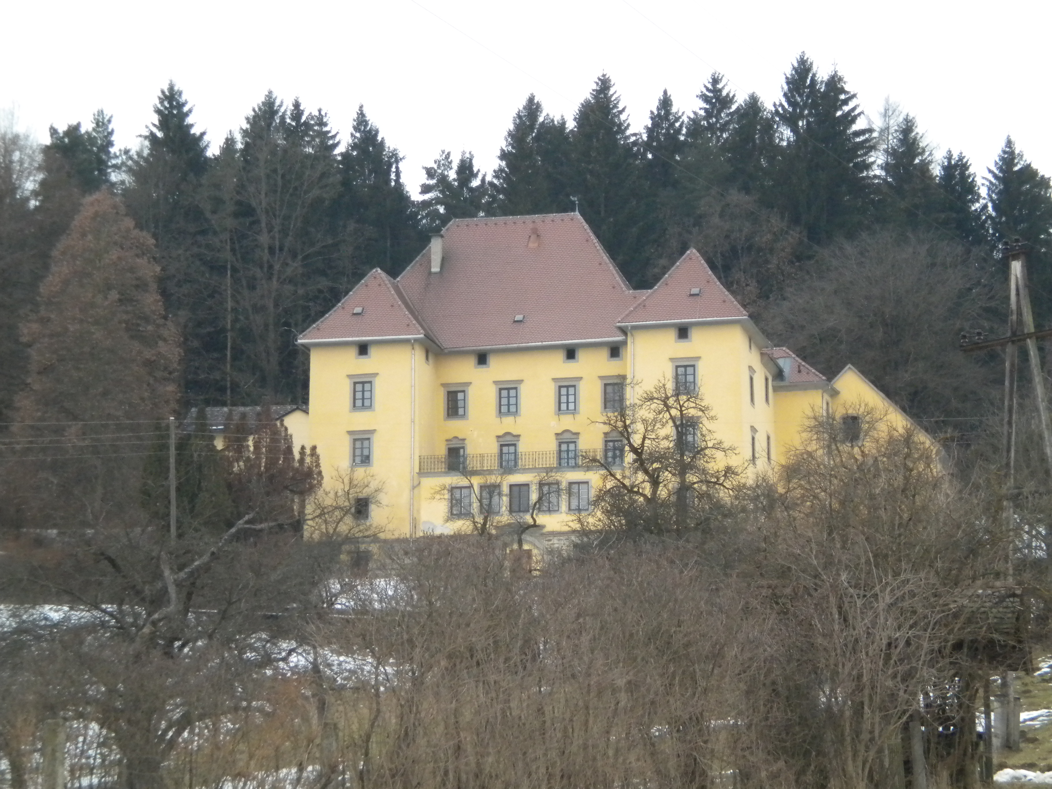 Schloss Kollegg, Haus der Einkehr